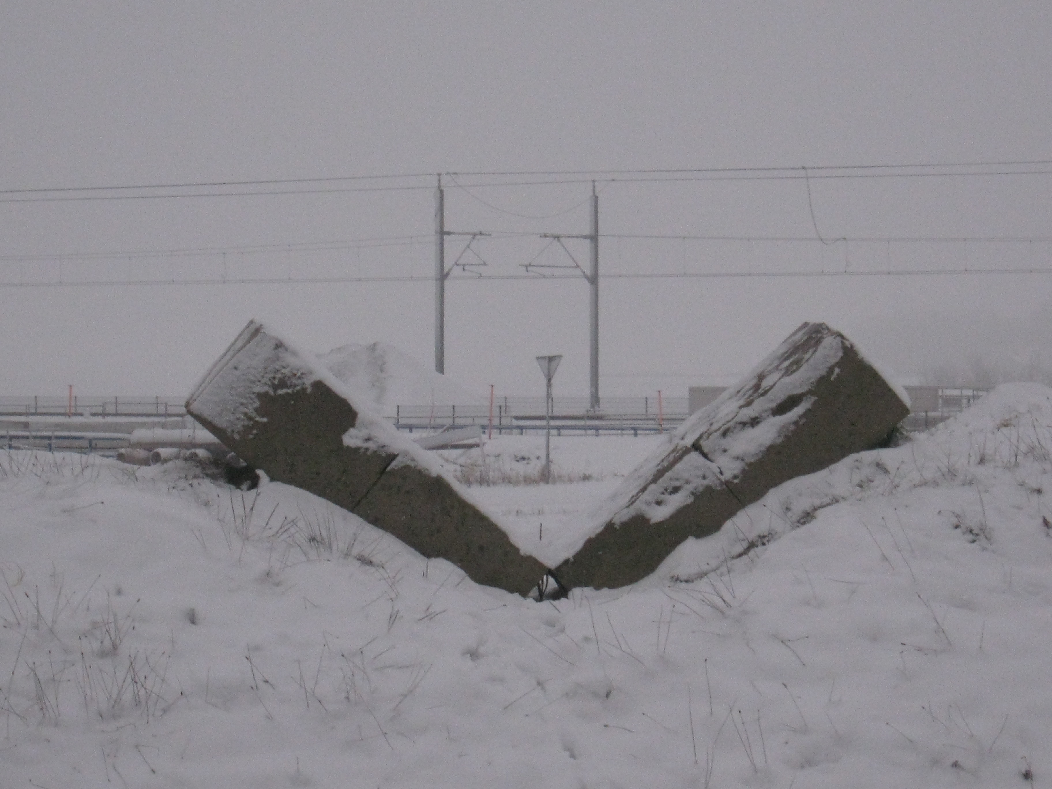 De winterzichtlijn van het Observatorium Robert Morris wordt verhinderd door de portalen van de Hanzelijn.